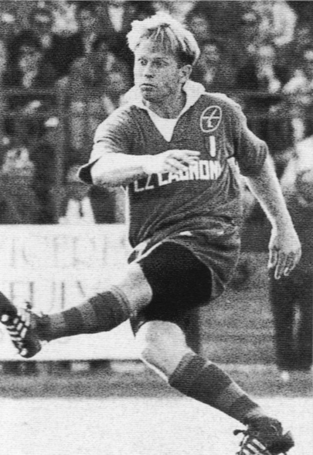 Il rugbista sudafricano Naas Botha con la maglia del Rugby Rovigo 1987, Botha Botha, Naas